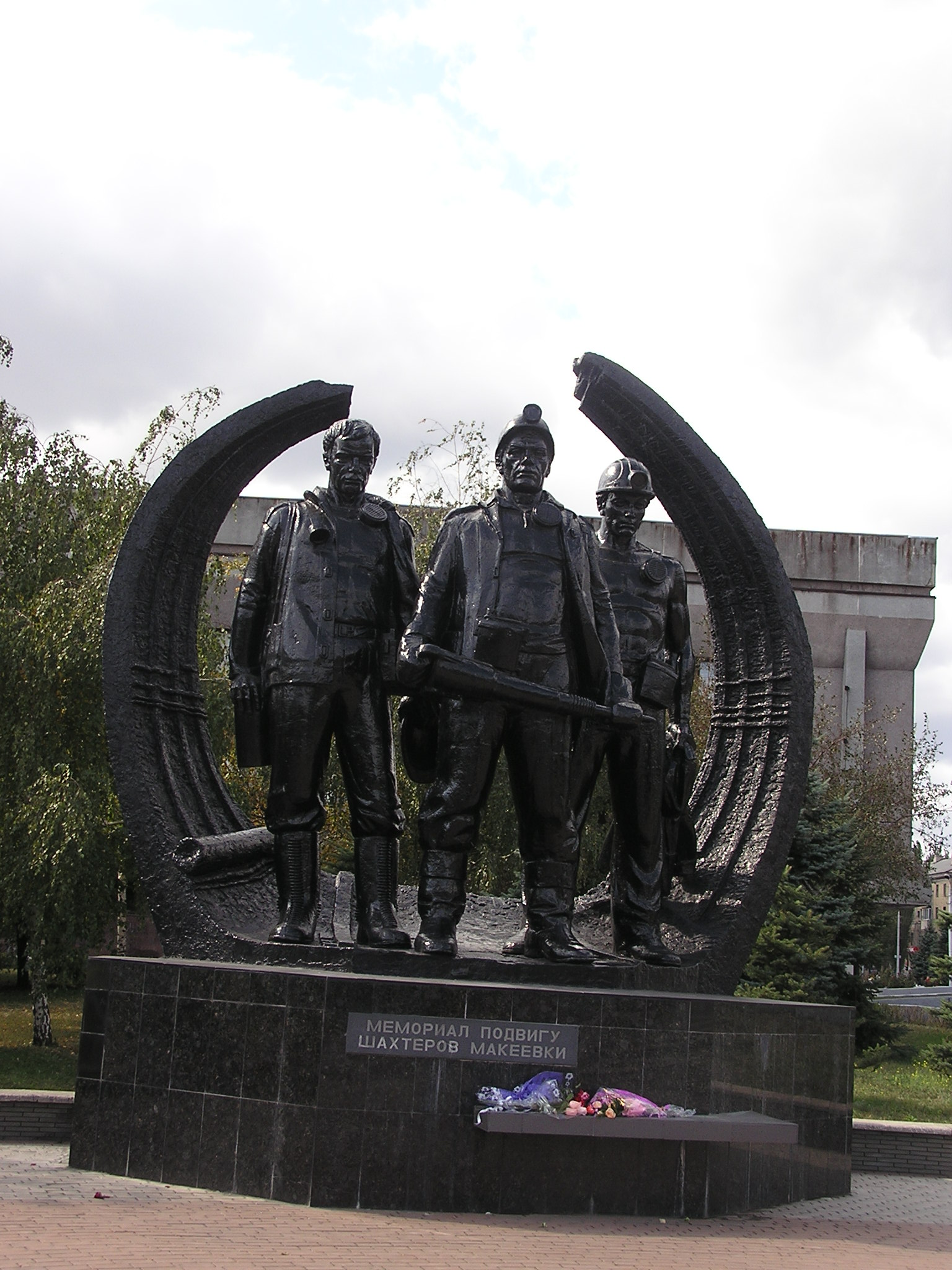 Макеевка